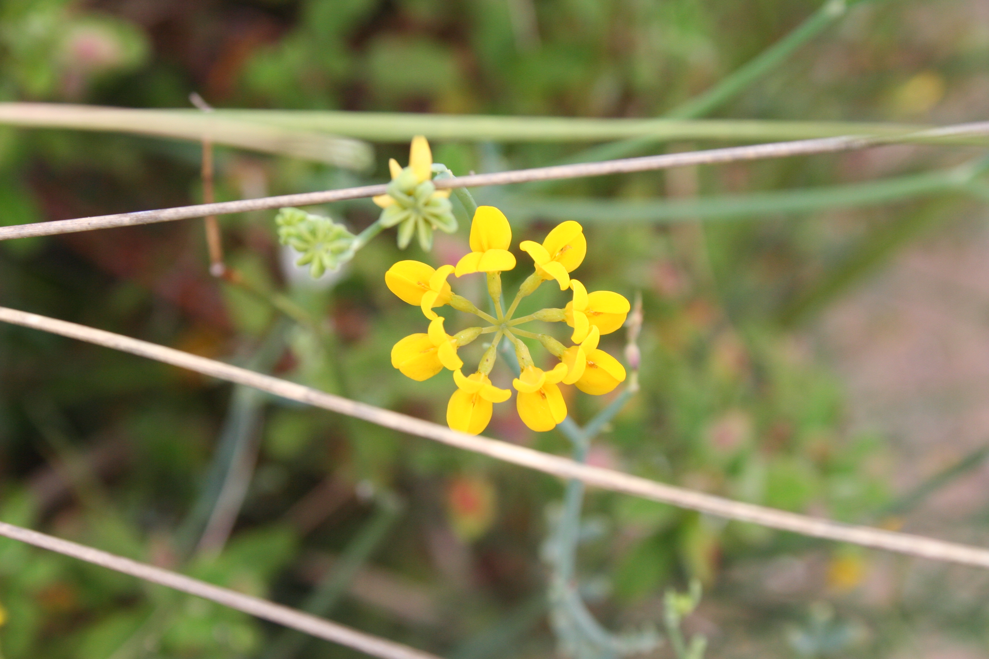 Coronilla juncea L. en el Parque Natural de la Albufera de Valencia.